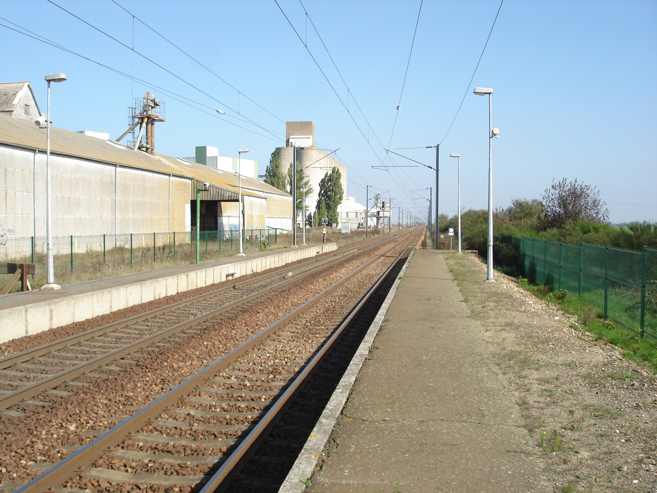 Gare de Marchezais - Broué (28) : Vue en direction de Paris, de l'extrémités des quais.